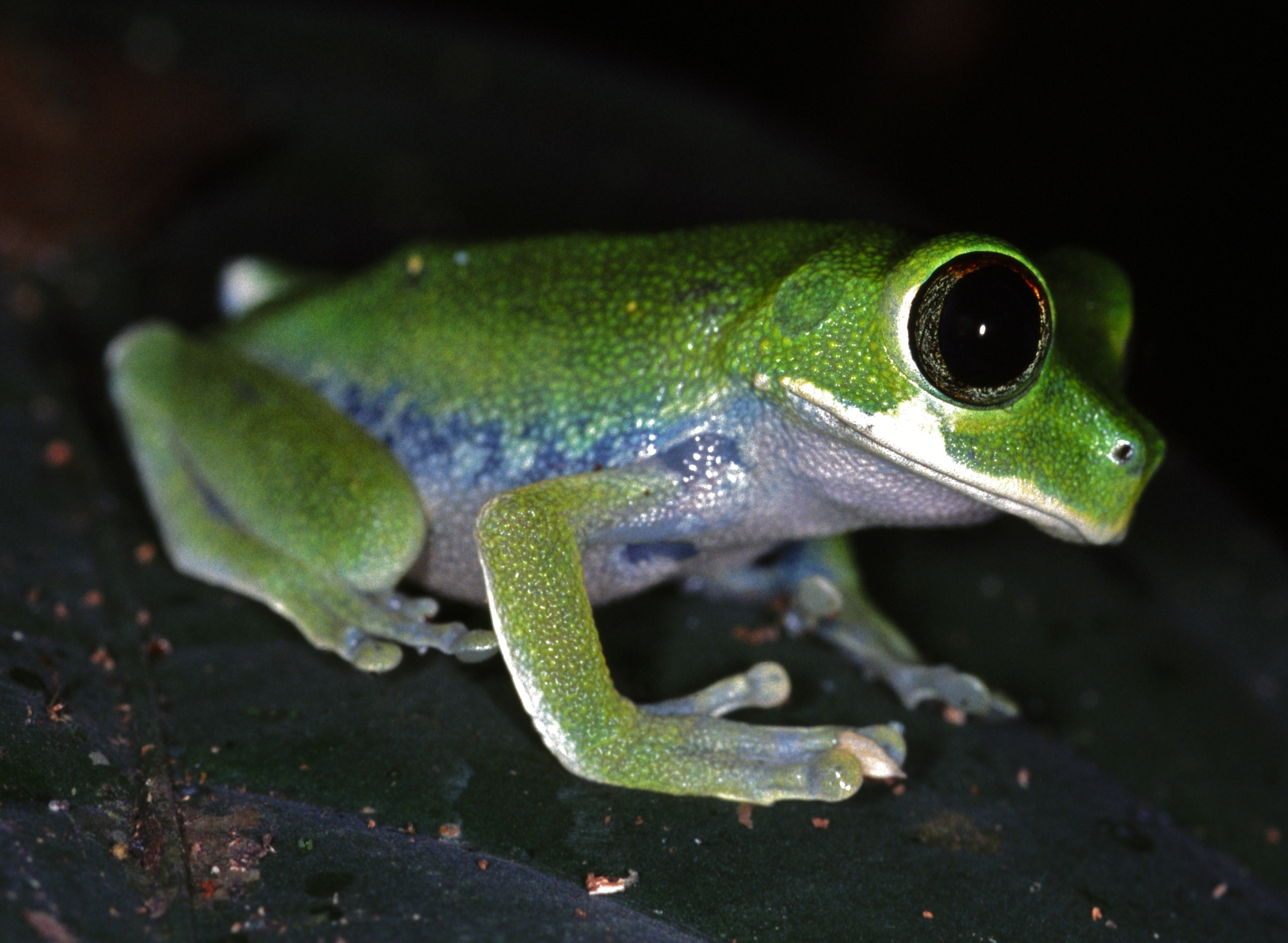 Korup NP, CAMEROON